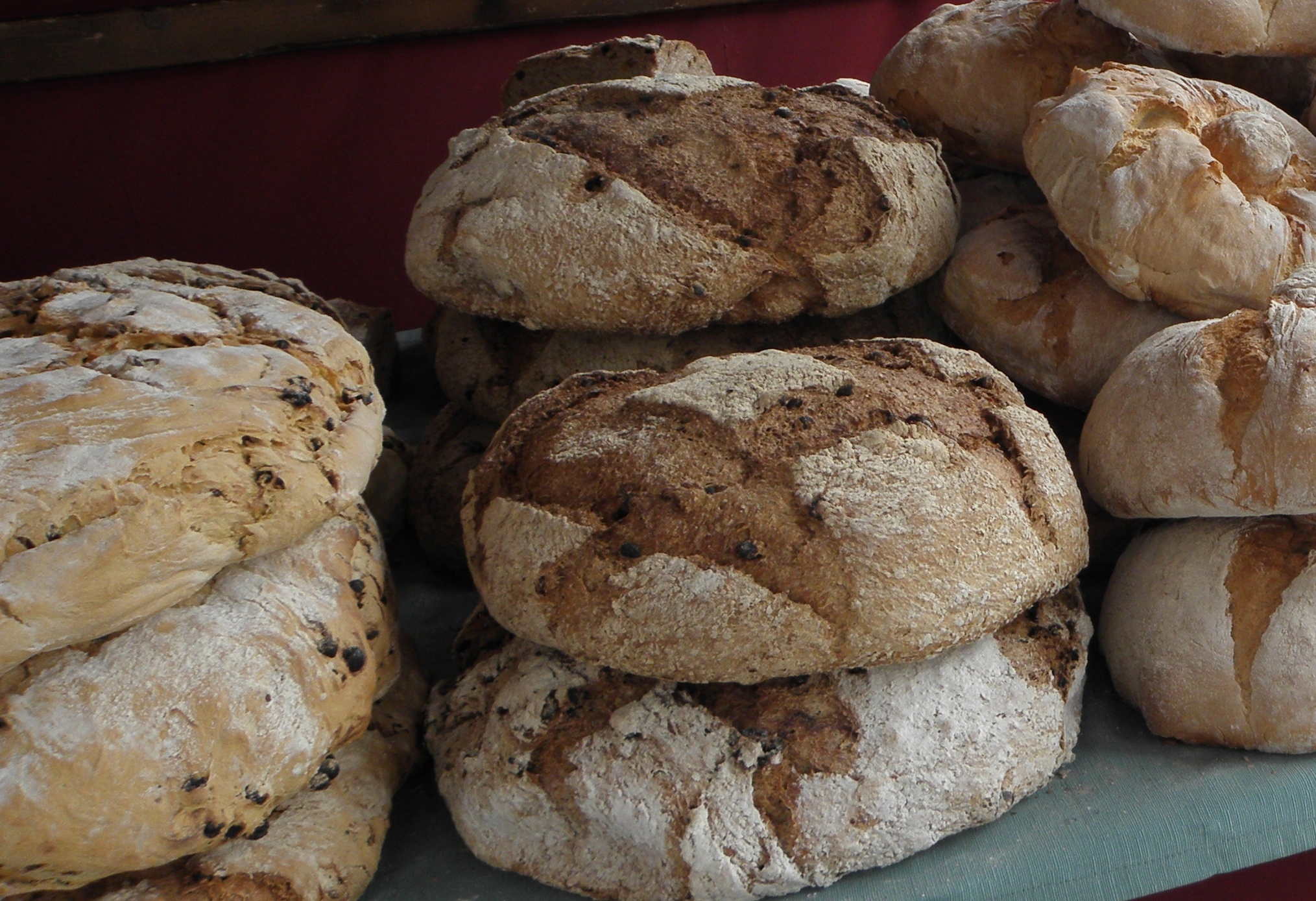 Pan artesán galego